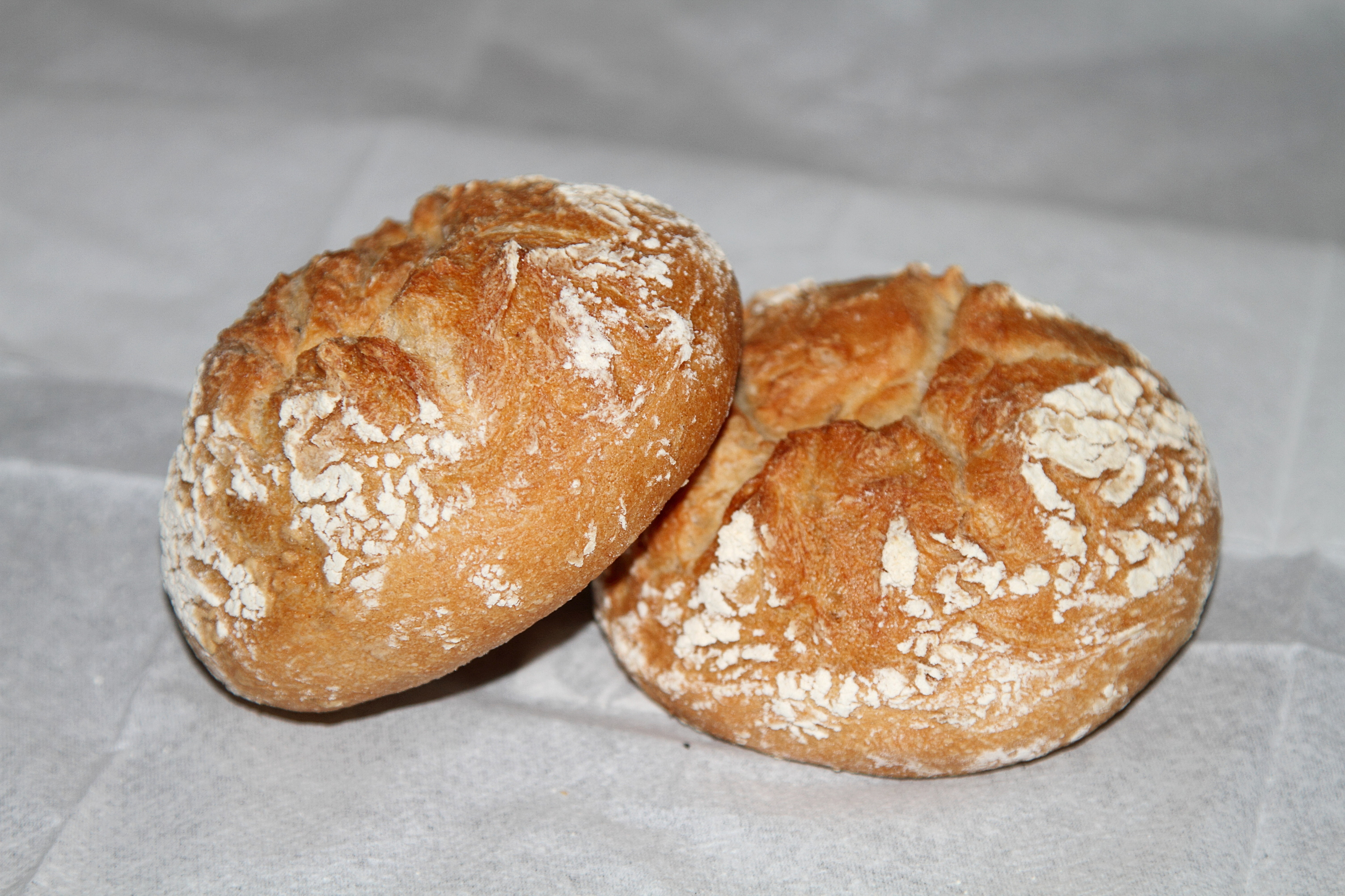 Wacherlaberl oder auch Wachauer Laberl, Österreichische Brotspezialät.